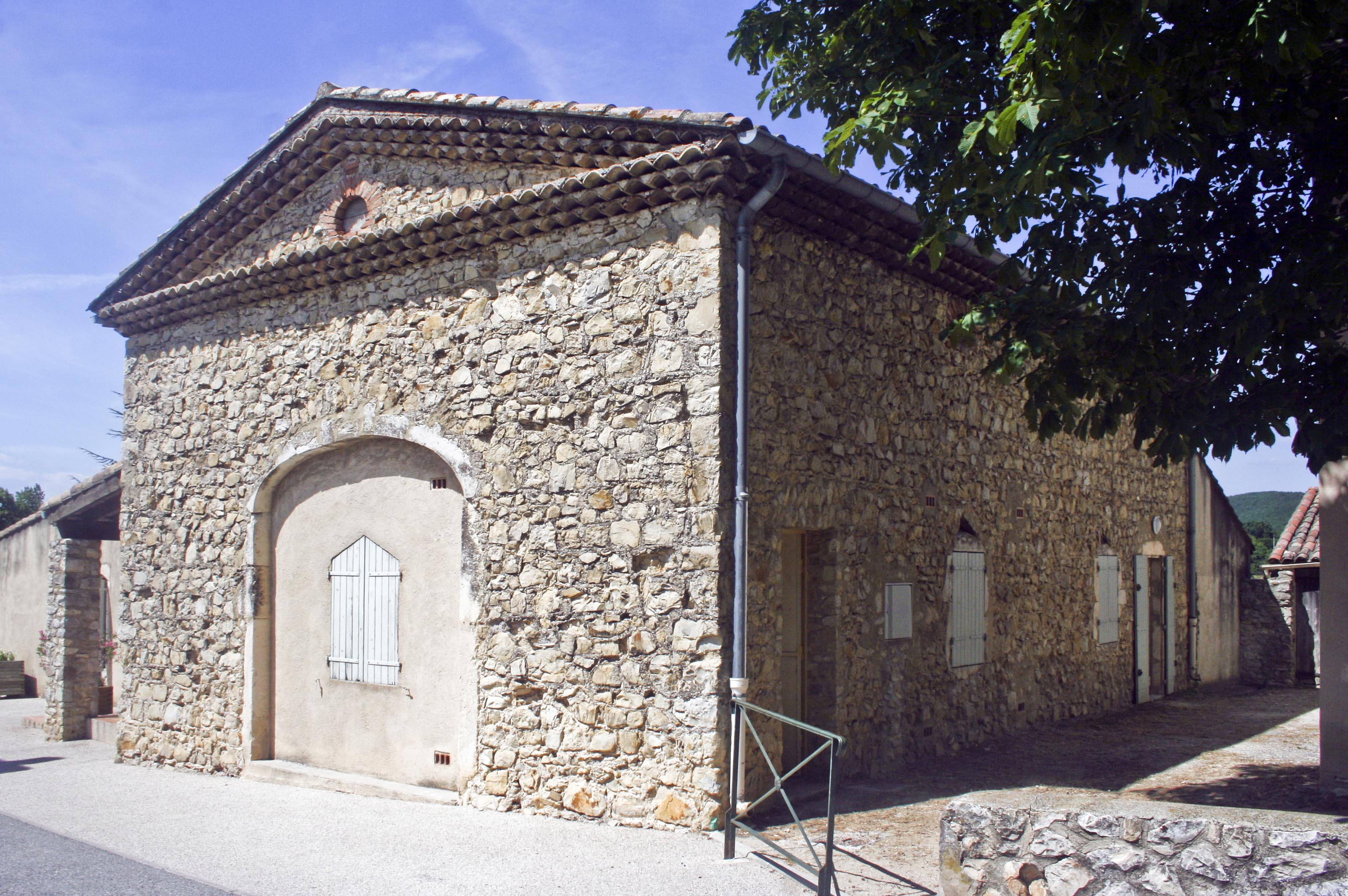 Cliouscat (Drôme, France), maison avec génoises formant fronton.